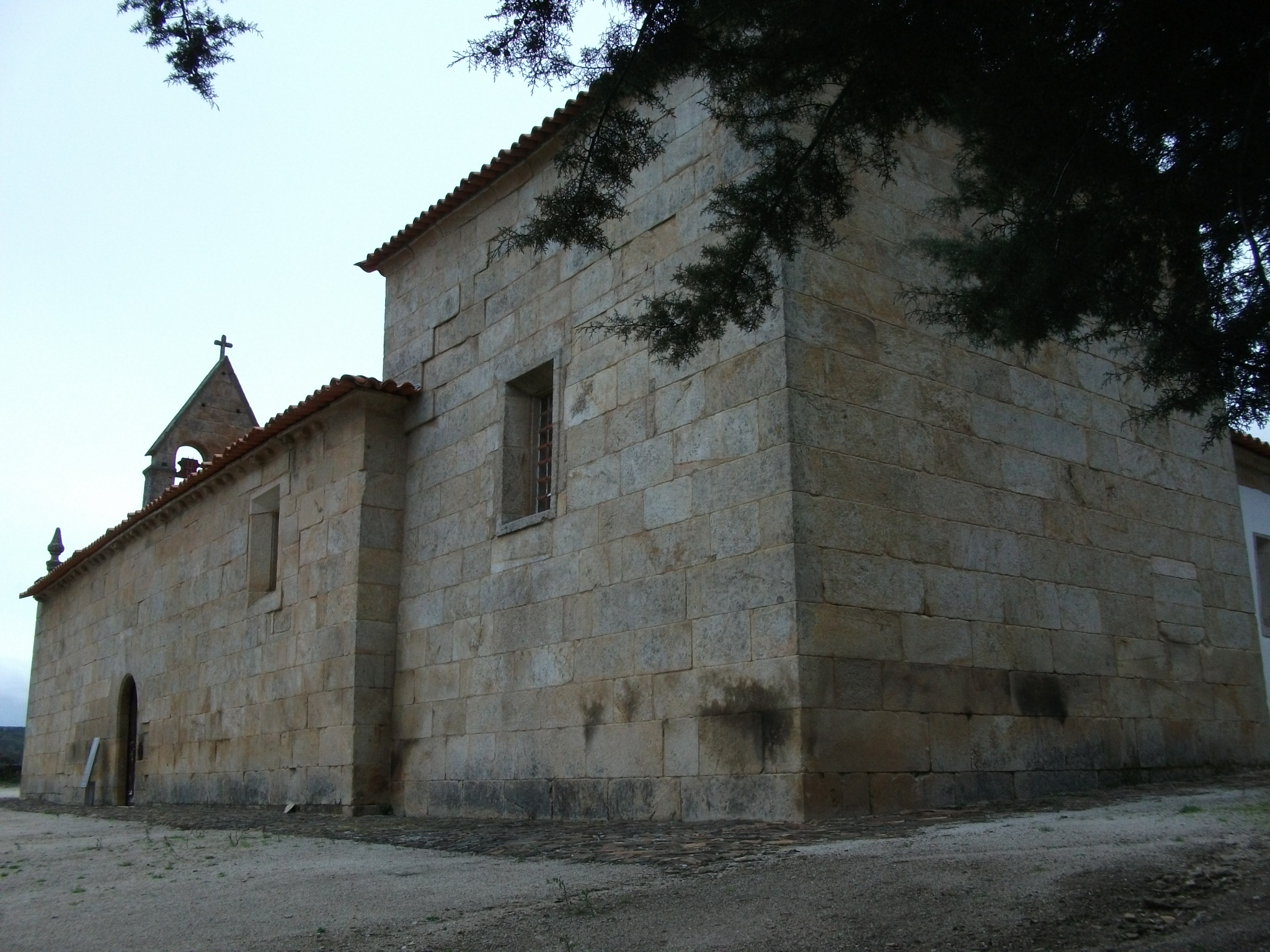 Fachadas lateral e posterior da Igreja de São Tomé, emAbambres, Mirandela.